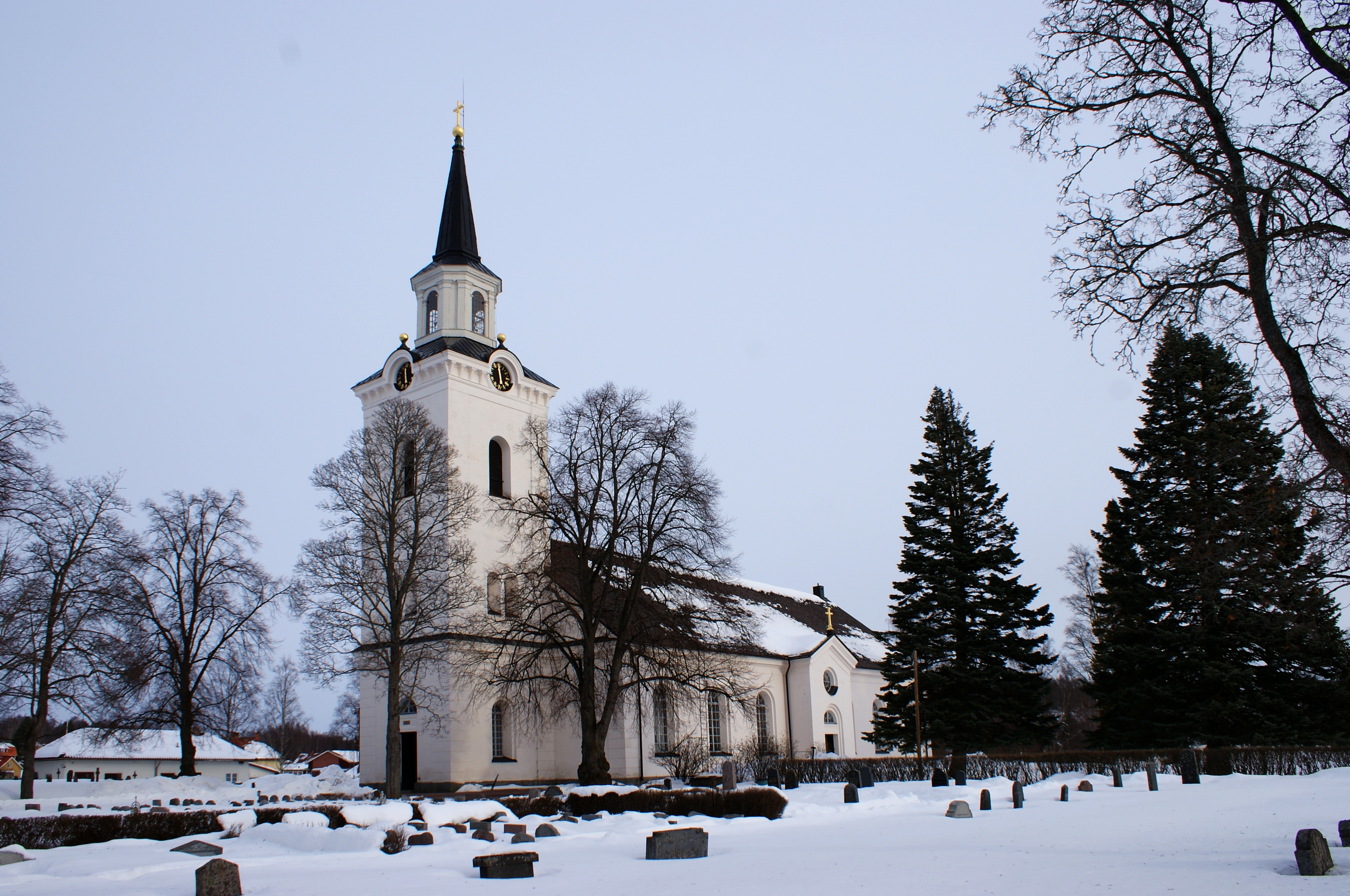 Siljansnäs kyrka, januari 2011.